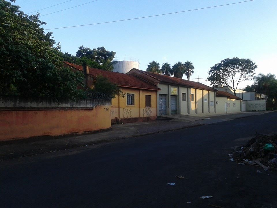 fachada da velha estação Ribeirão Preto da SPM